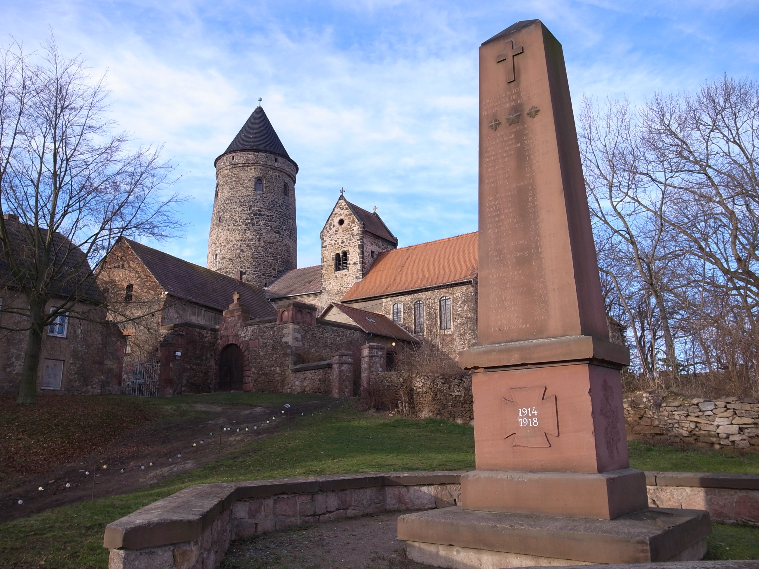 Hohenturm, Gedenkstein 1914-1918